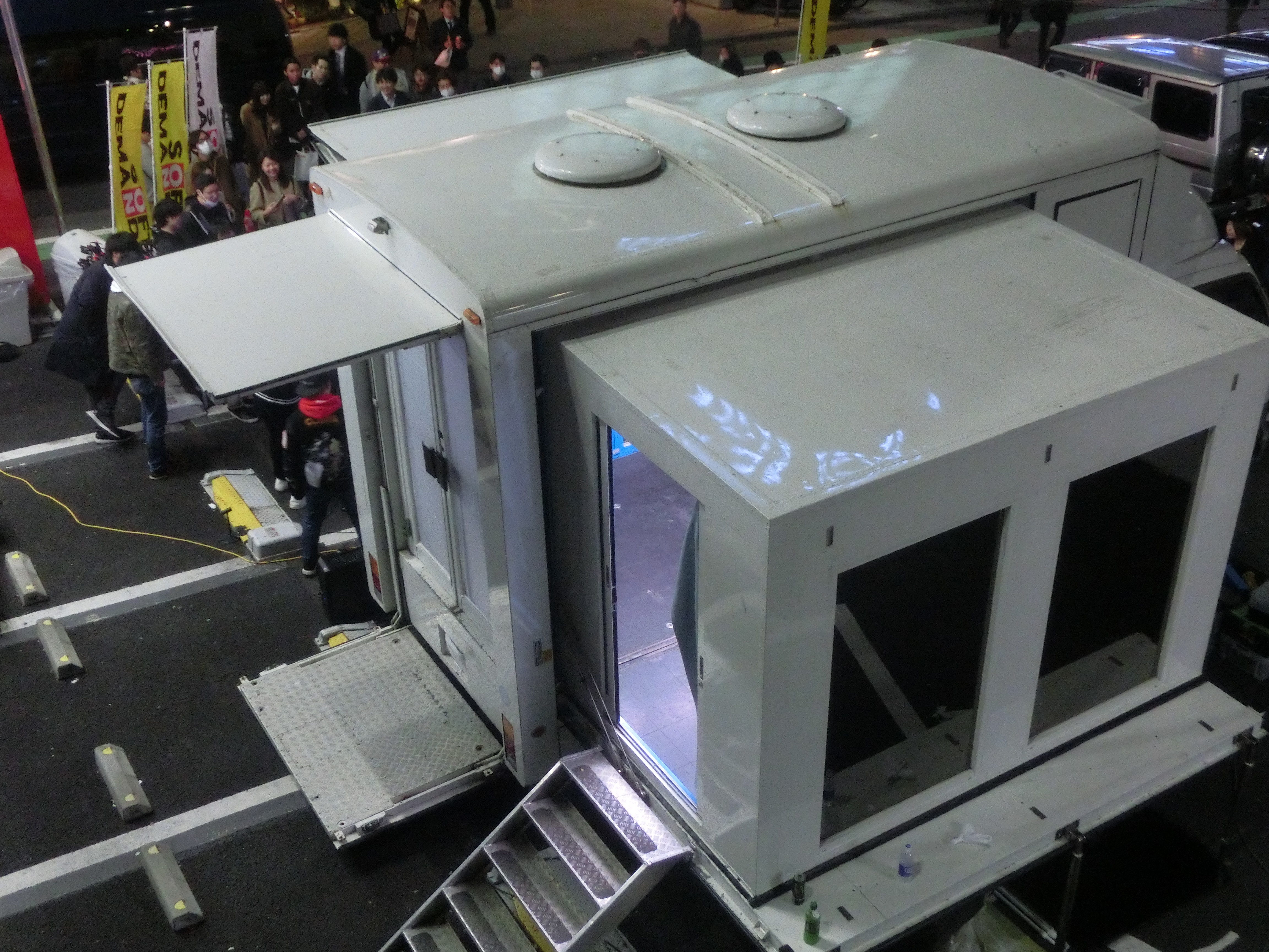 「DTテレビ」2019年3月14日、渋谷・ホワイトデーイベント